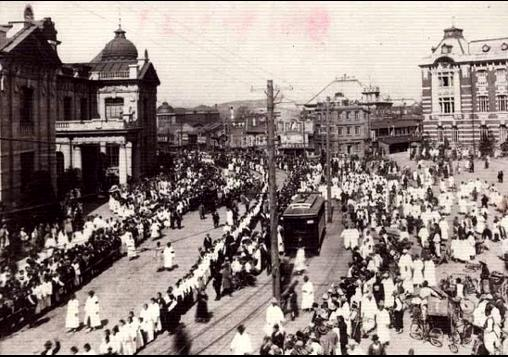 한국의 독립운동가 월남 이상재 선생 사회장 행렬 모습.